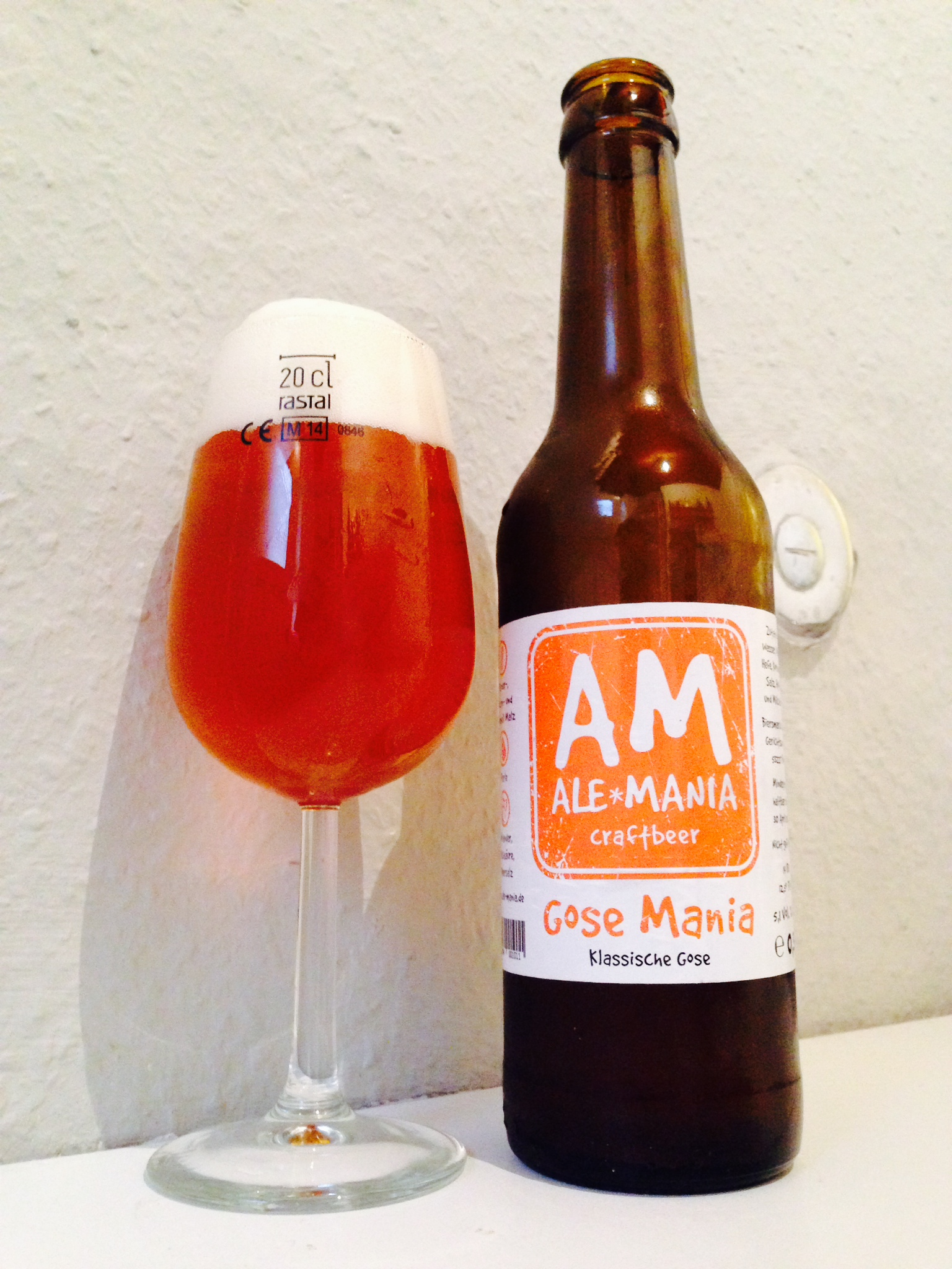 Flasche und Glas mit Gose von der Brauerei Ale*Mania aus Bonn